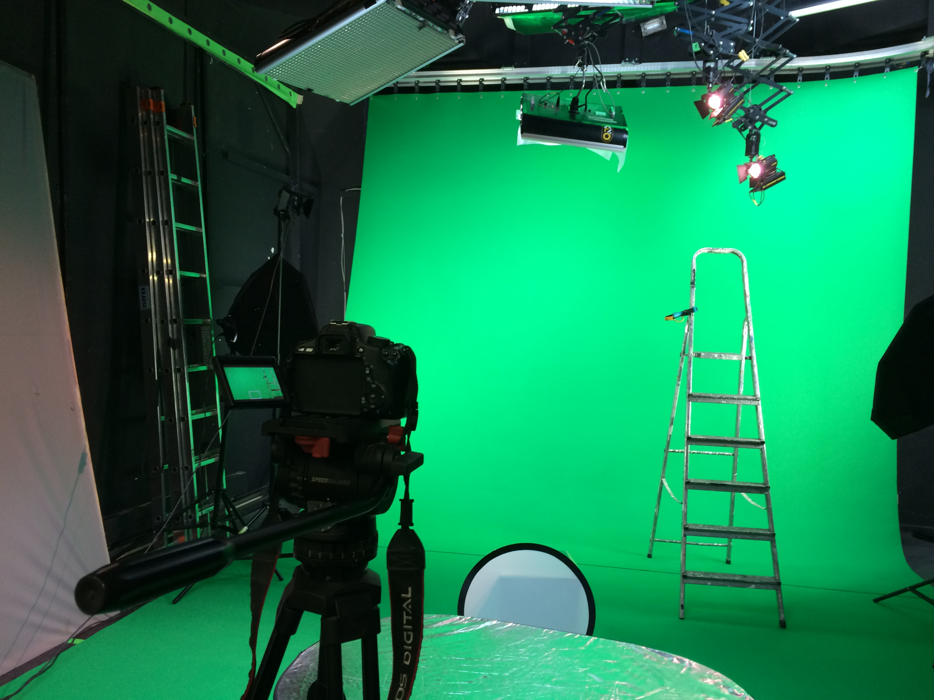 Greenboxstudio der Medienwerkstatt